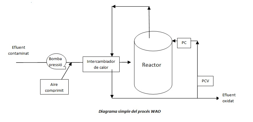 Esquema del procés d'oxidació humida (WAO)